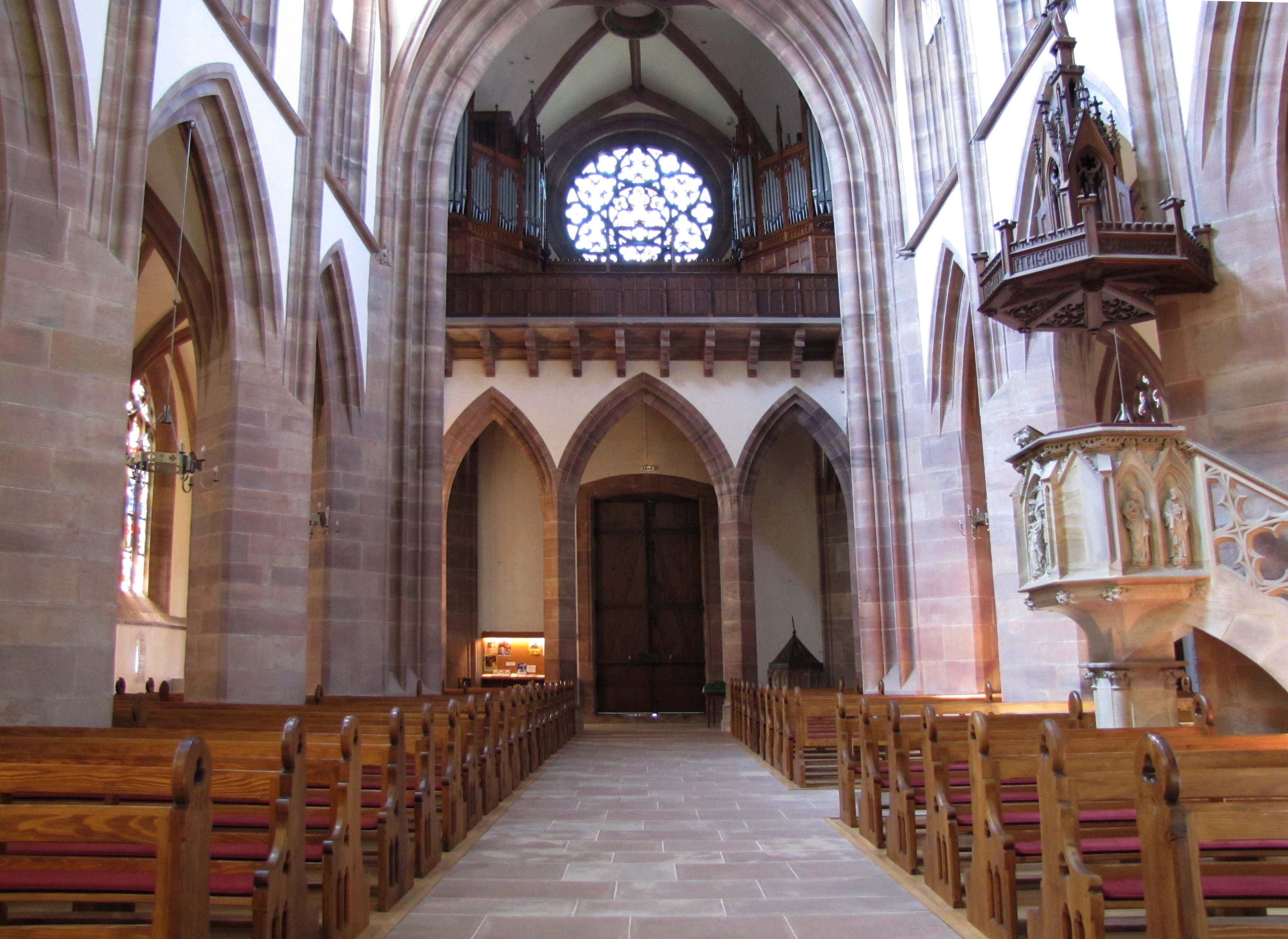 Alsace, Bas-Rhin, Niederhaslach, Collégiale Saint-Florent: (PA00084831, IA67011296, IA67011295): Vue intérieure de la nef vers la tribune d'orgue. Chaire à prêcher (XIXe)